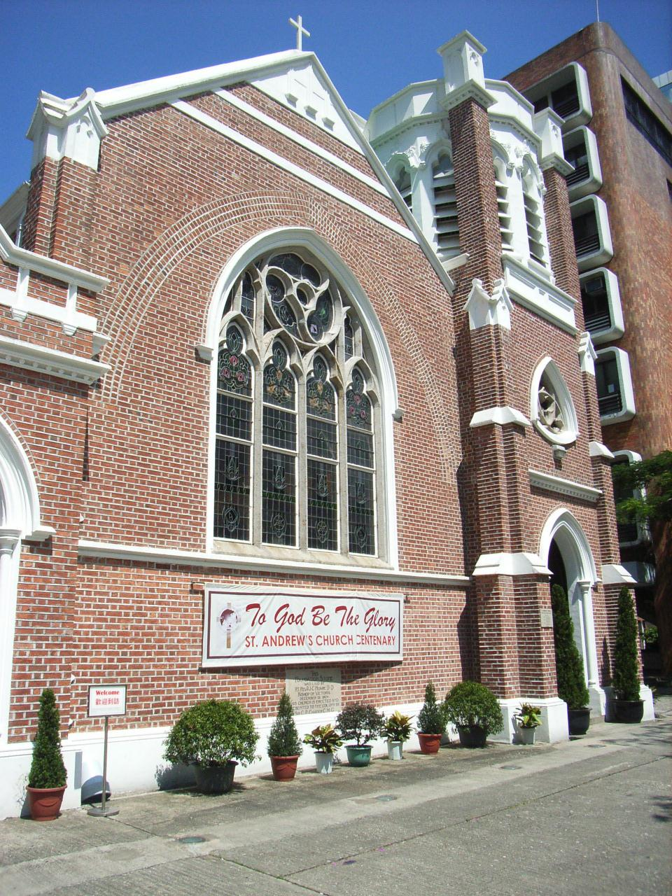 Tsim Sha Tsui, Kowloon, Hong Kong Photo by TonySKTO